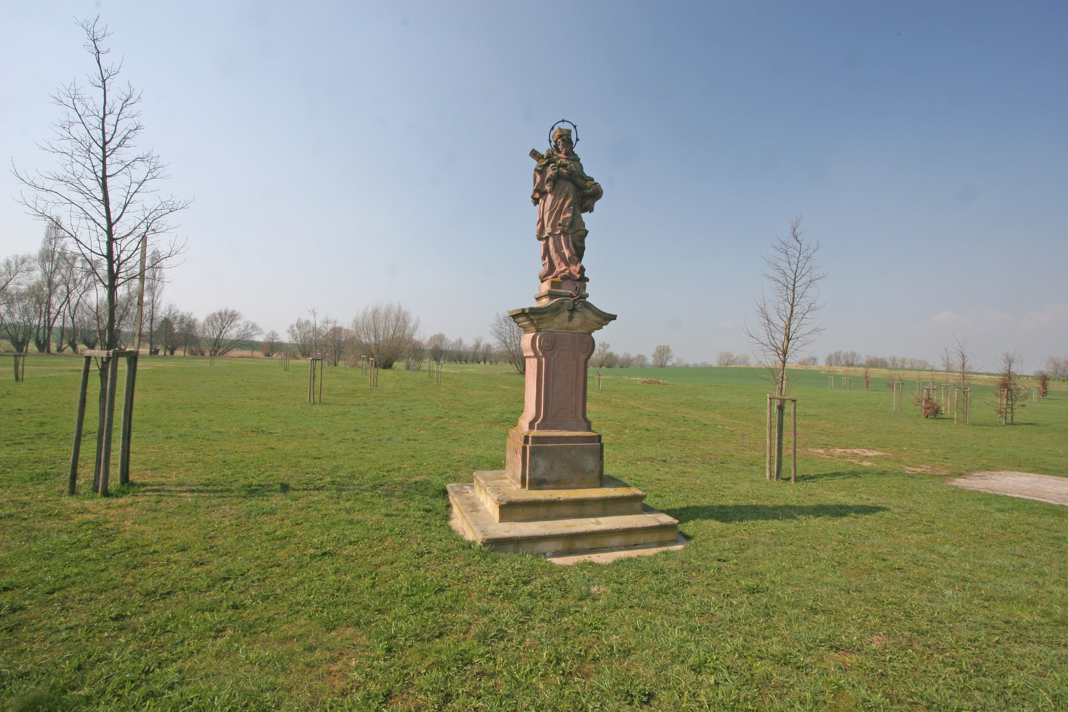 Socha sv. Jana Nepomuckého (Vitiněves), za mostkem směrem na Malou Stranu, Vitiněves